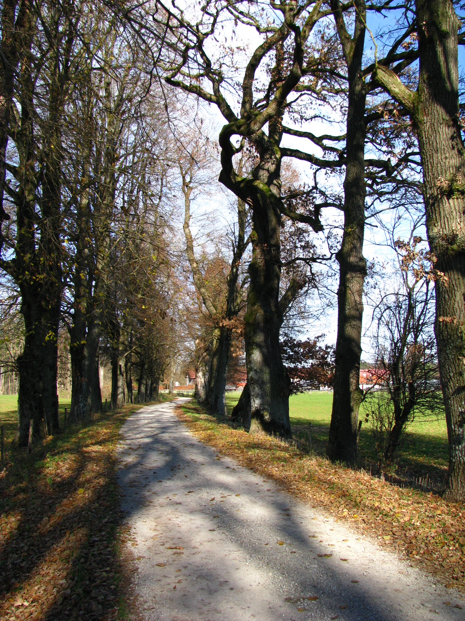 Naturdenkmal Wallenburger Allee bei Miesbach, Bayern